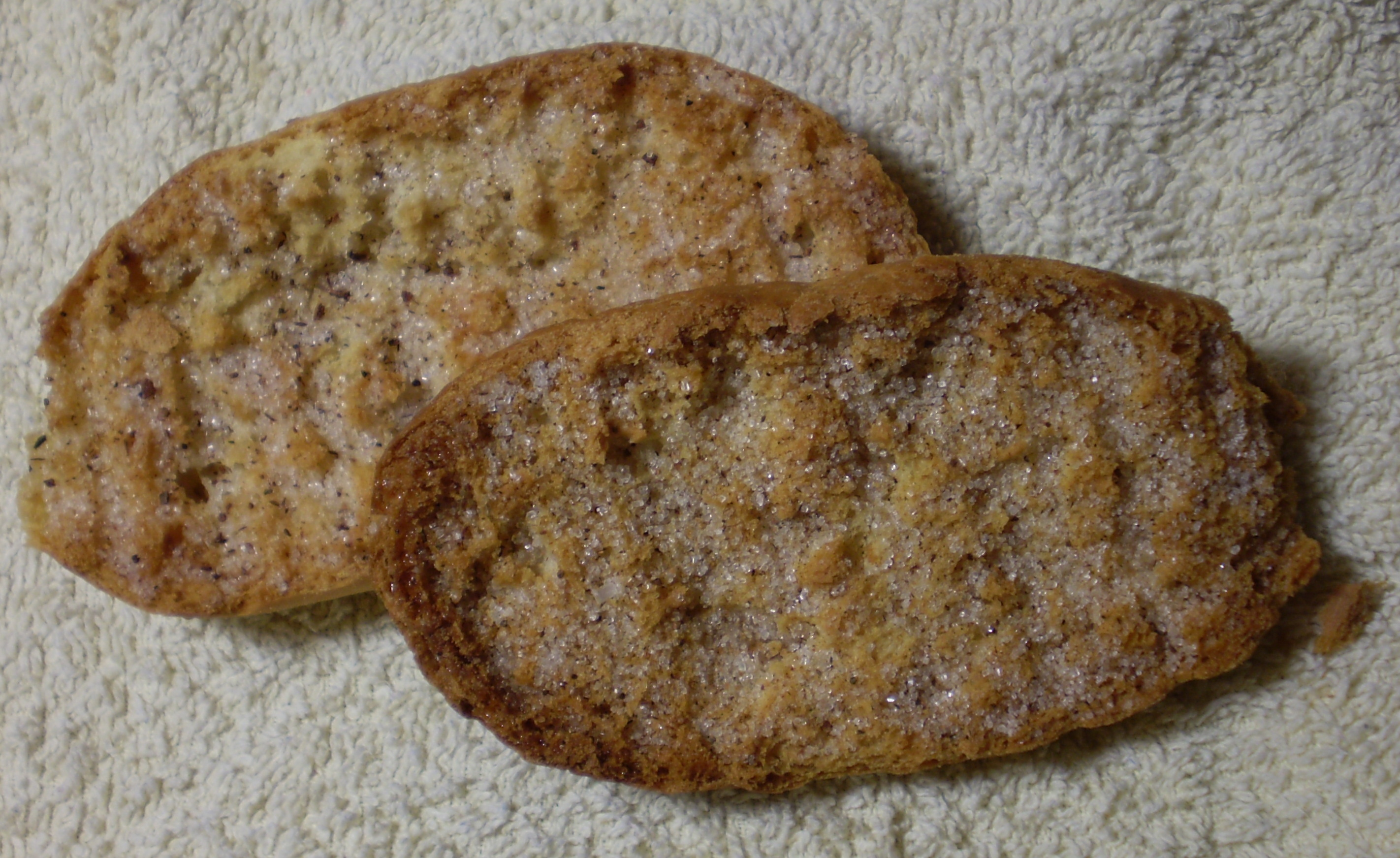 Kanelikorppuja